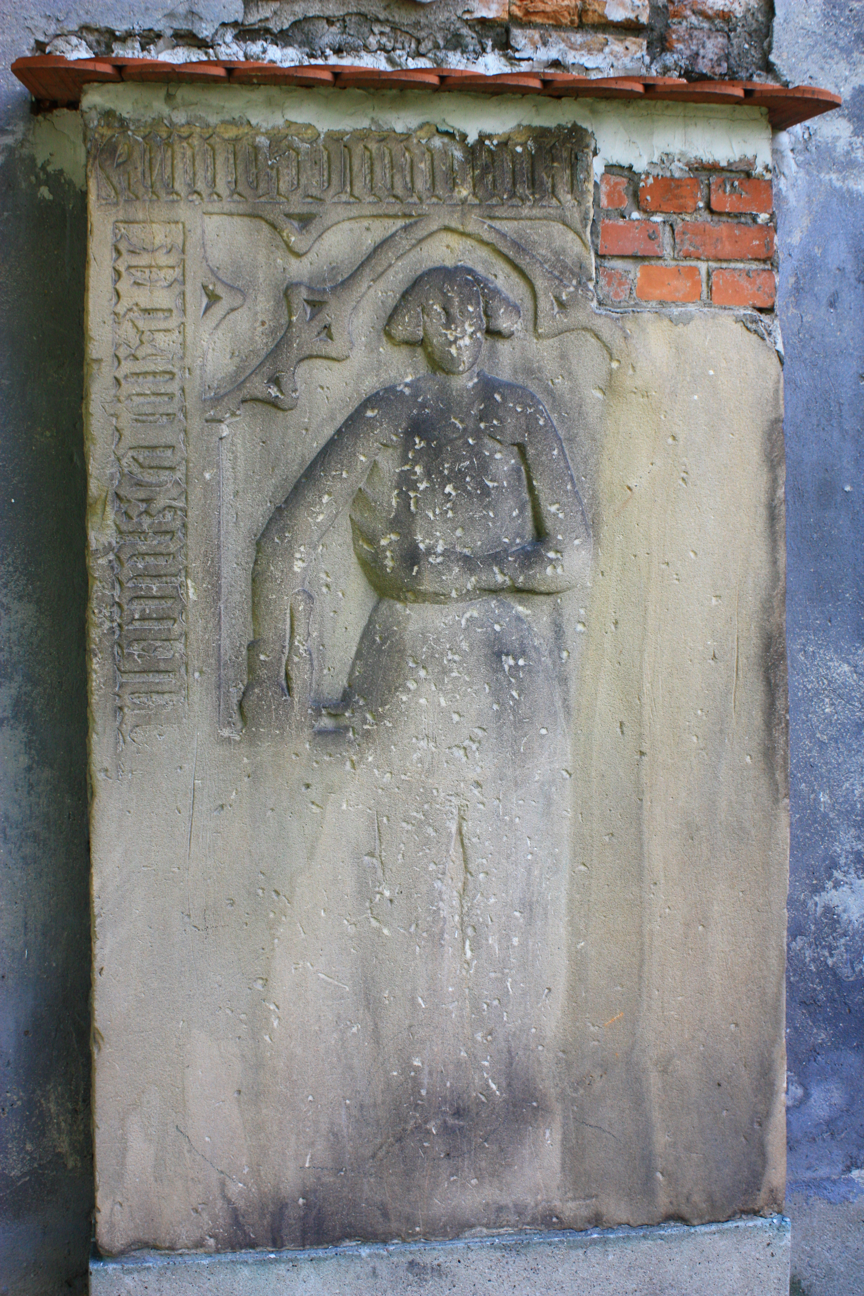 Prochowice, kościół ewangelicki, ob. rzym.-kat. p.w. św. Andrzeja, XIV/XV, 1864